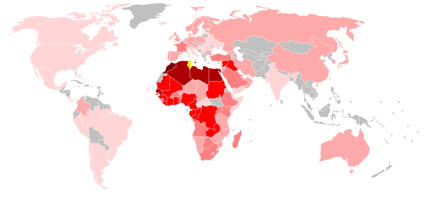 خريطة مواجهات منتخب تونس لكرة القدم حسب البلد